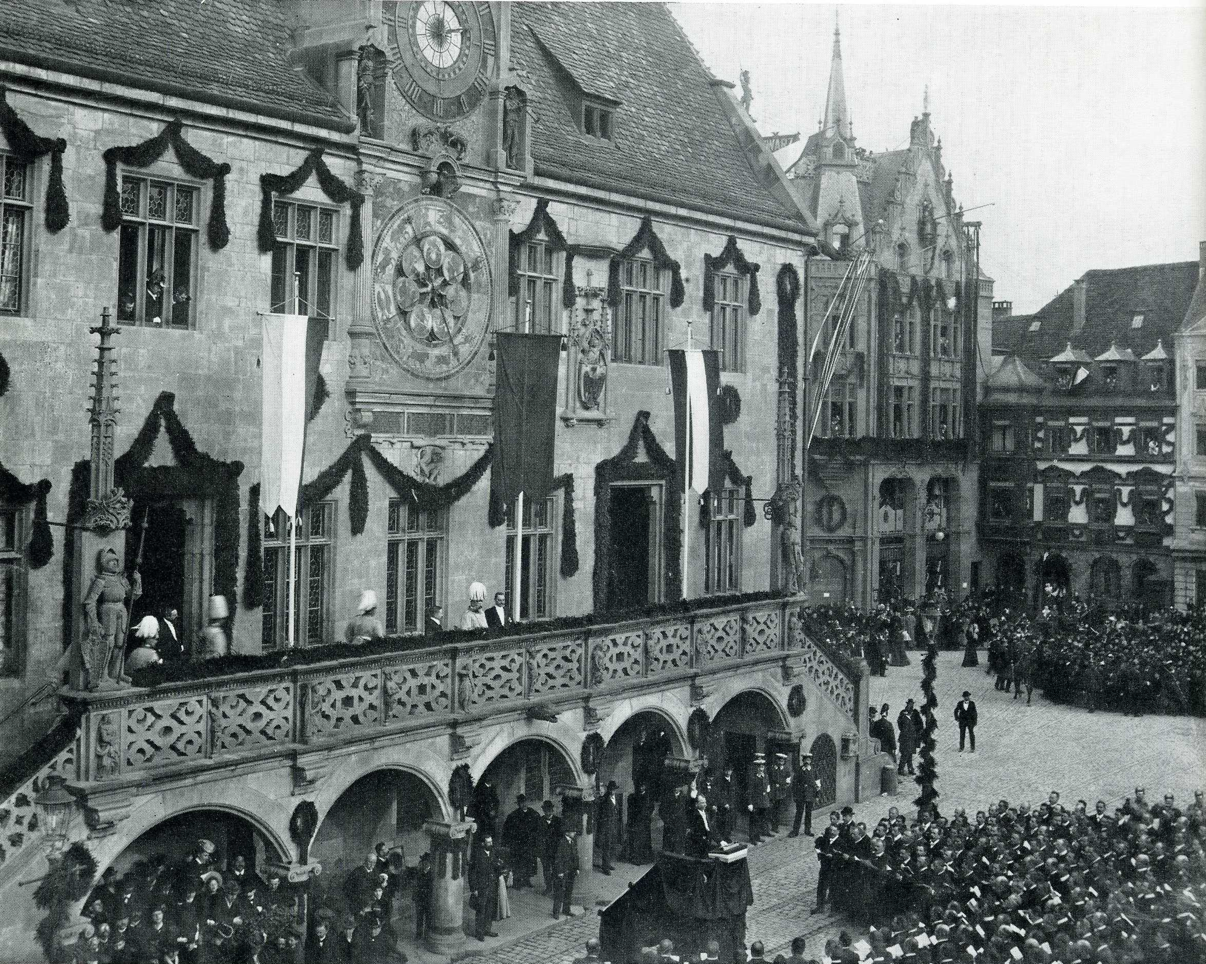 Heilbronner Rathaus beim Besuch von König Wilhelm II